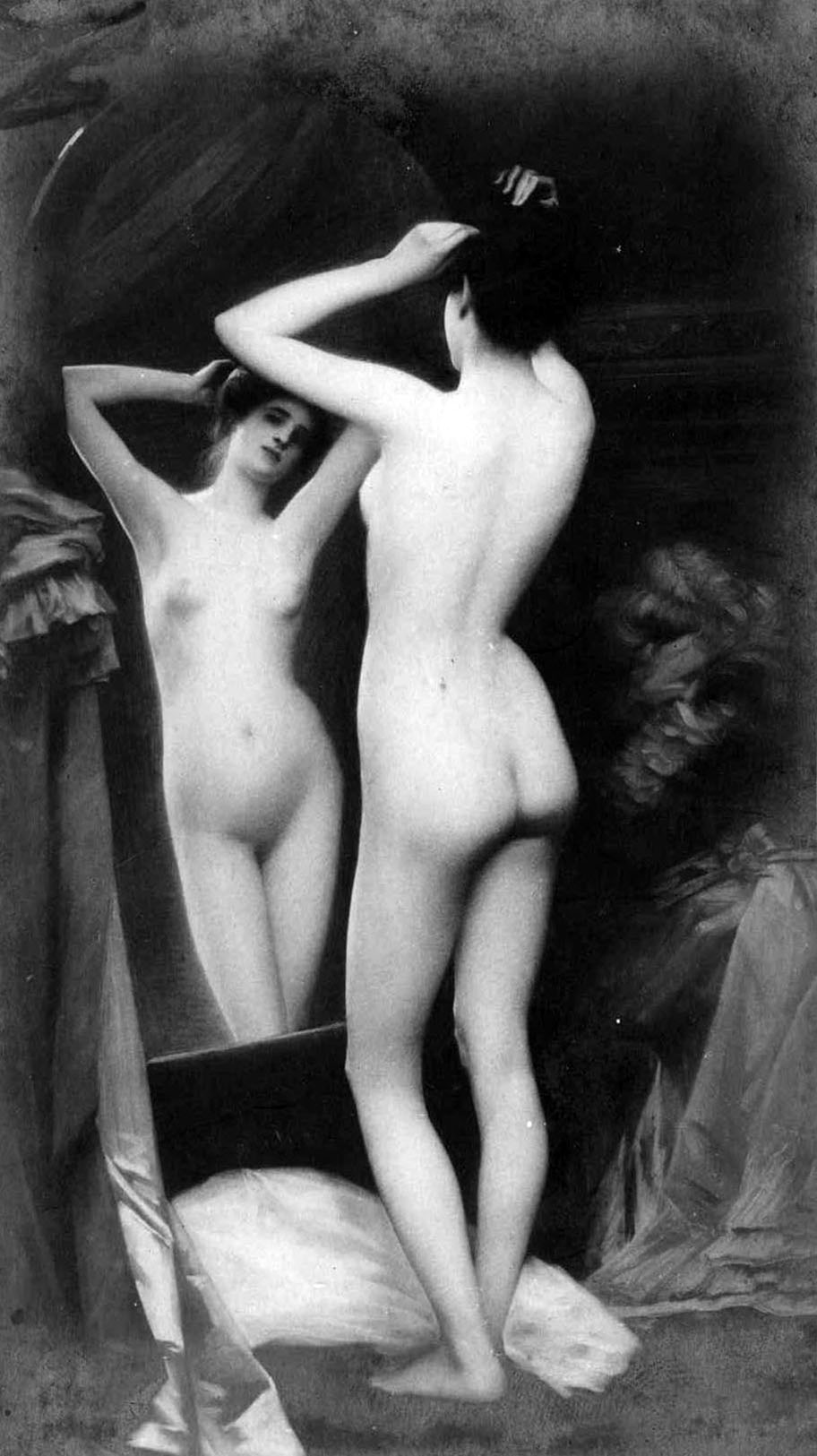 Devant la glace, par Gabriel de Cool. Salon de la Société des artistes français, 1909